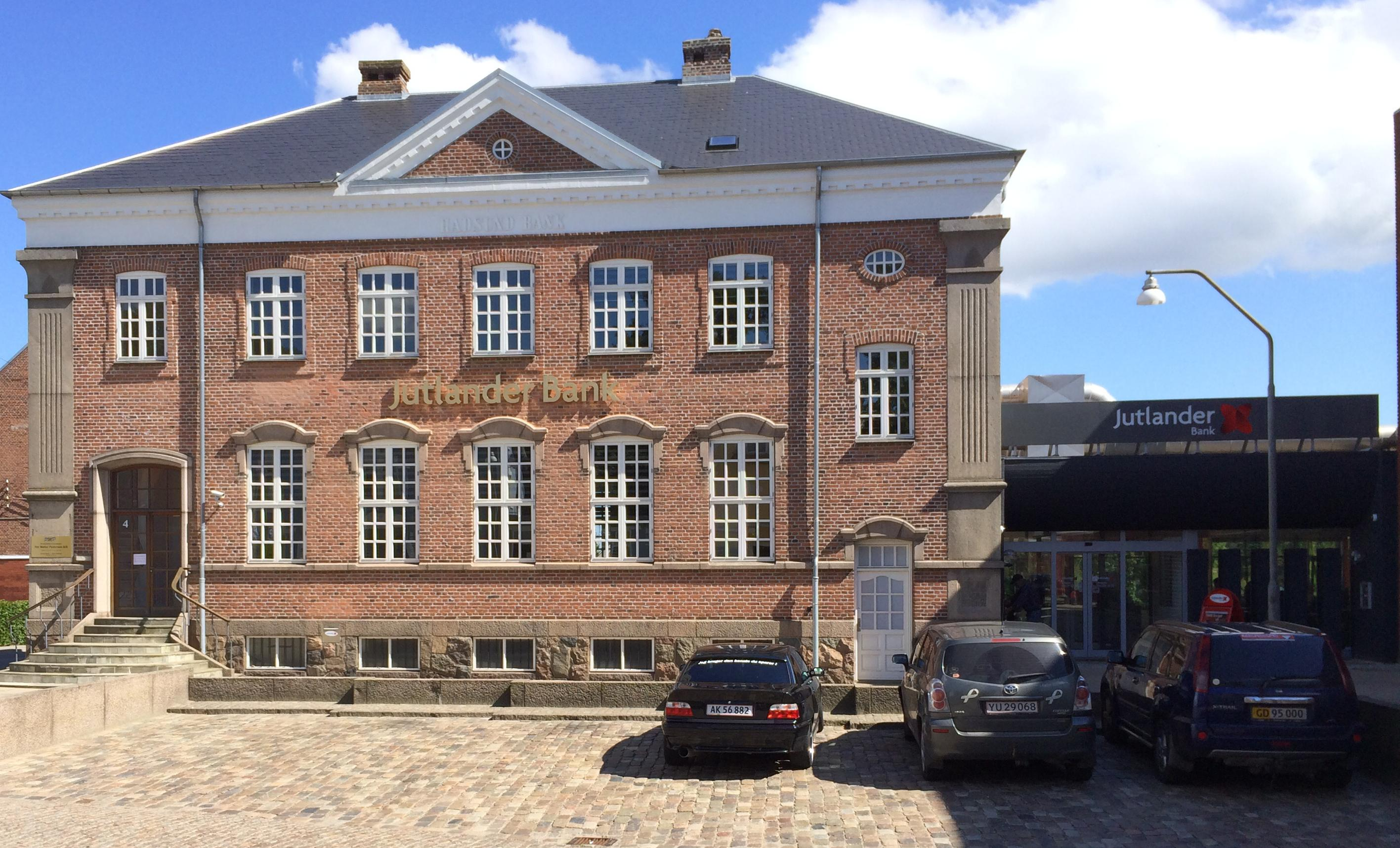 Jutlander Bank i Hadsund